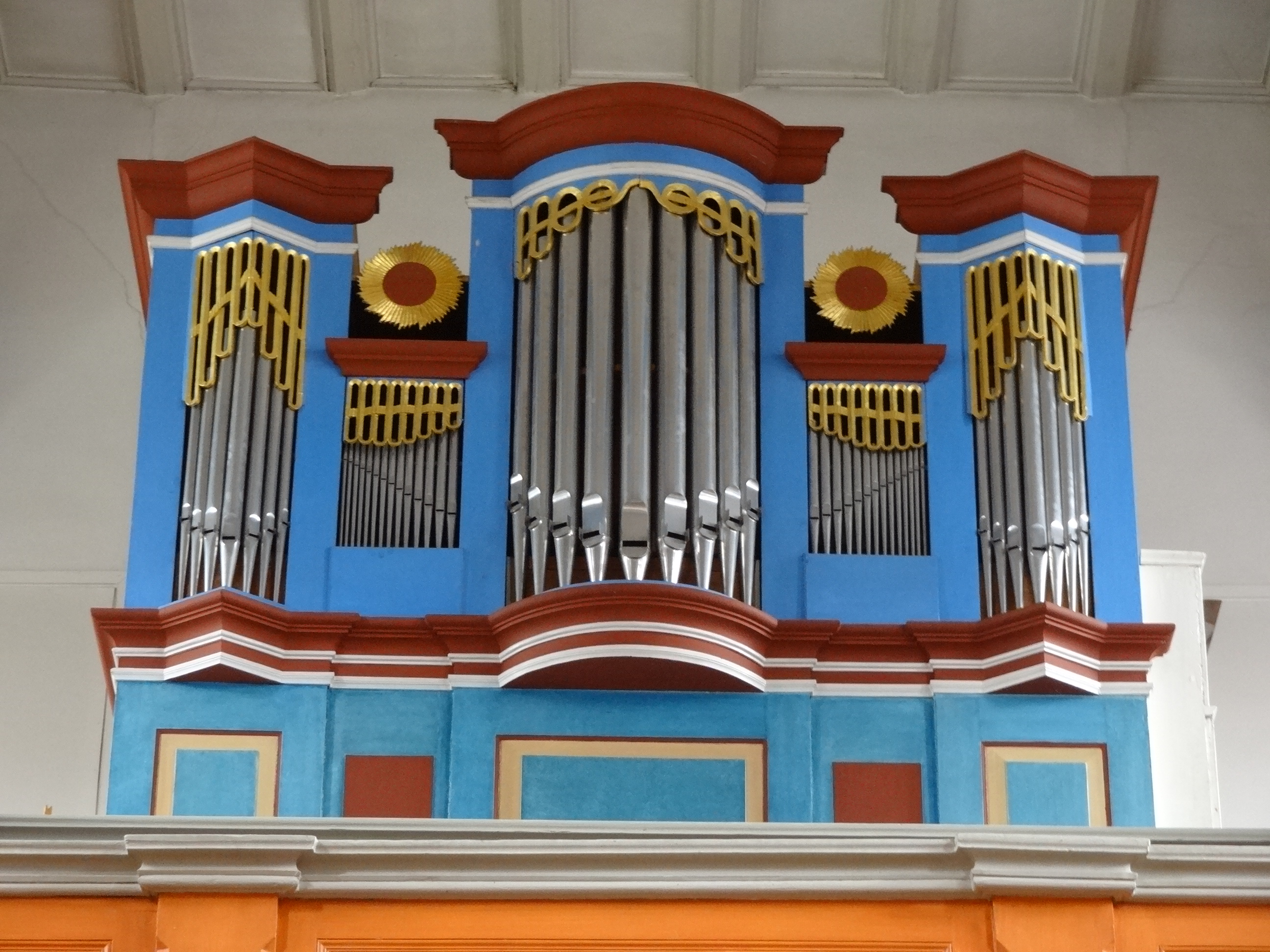 Evangelische Kirche Borsdorf